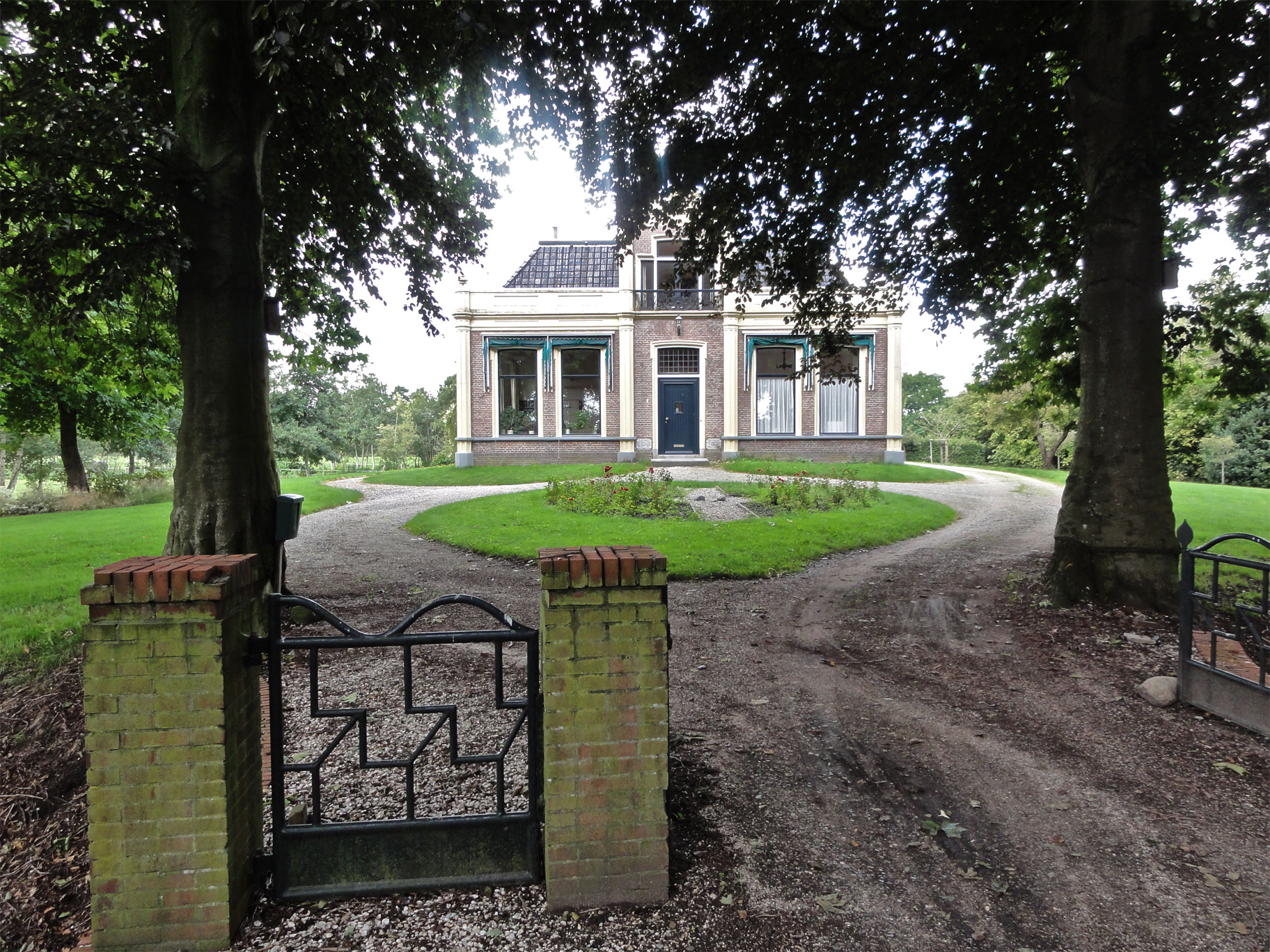 Torenlaan 1 It_Heechsan